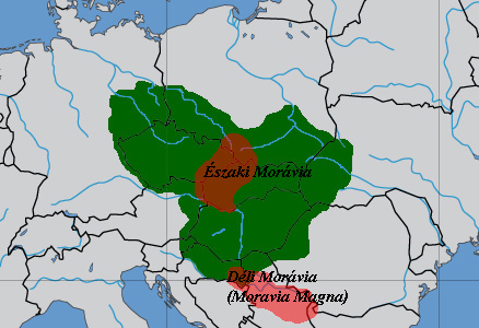 Moravia Magna és az északi Morávia valószínű elhelyezkedése